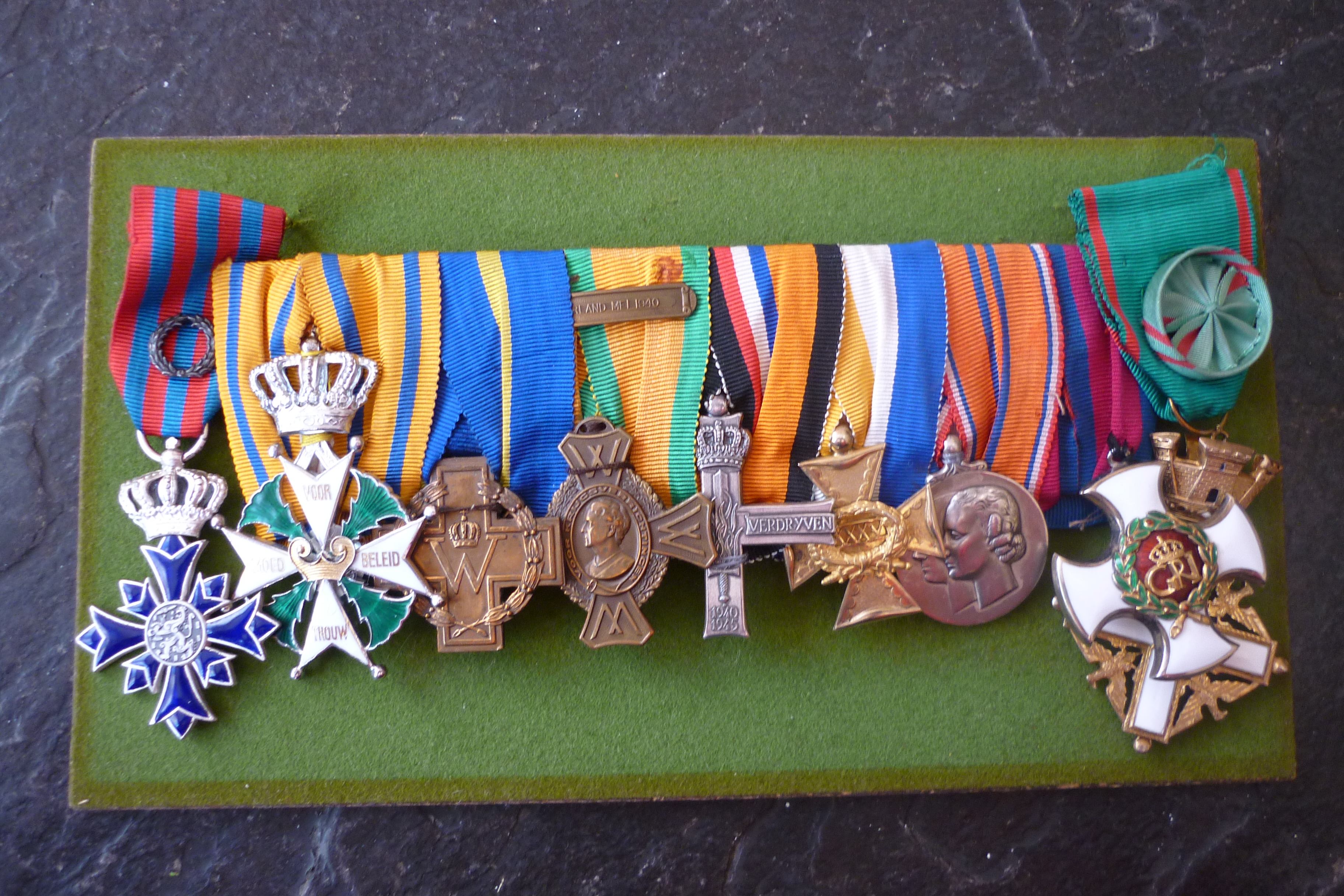 Onderscheidingen